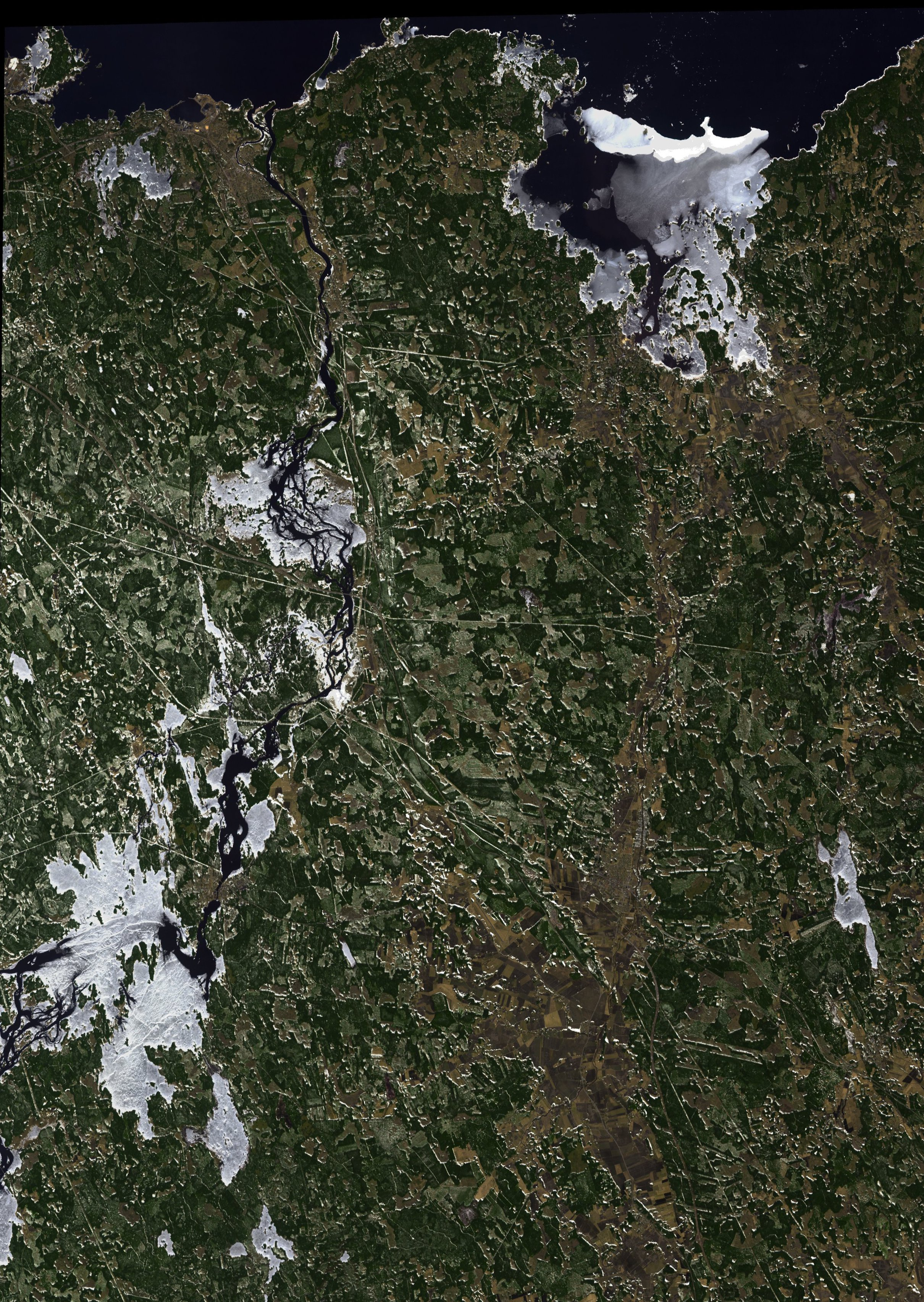 Photo du 3 avril 2004 montrant la fin de l'hiver le long du Dalälven (à gauche) et dans la plaine de la ville de Tierp , en Suède.